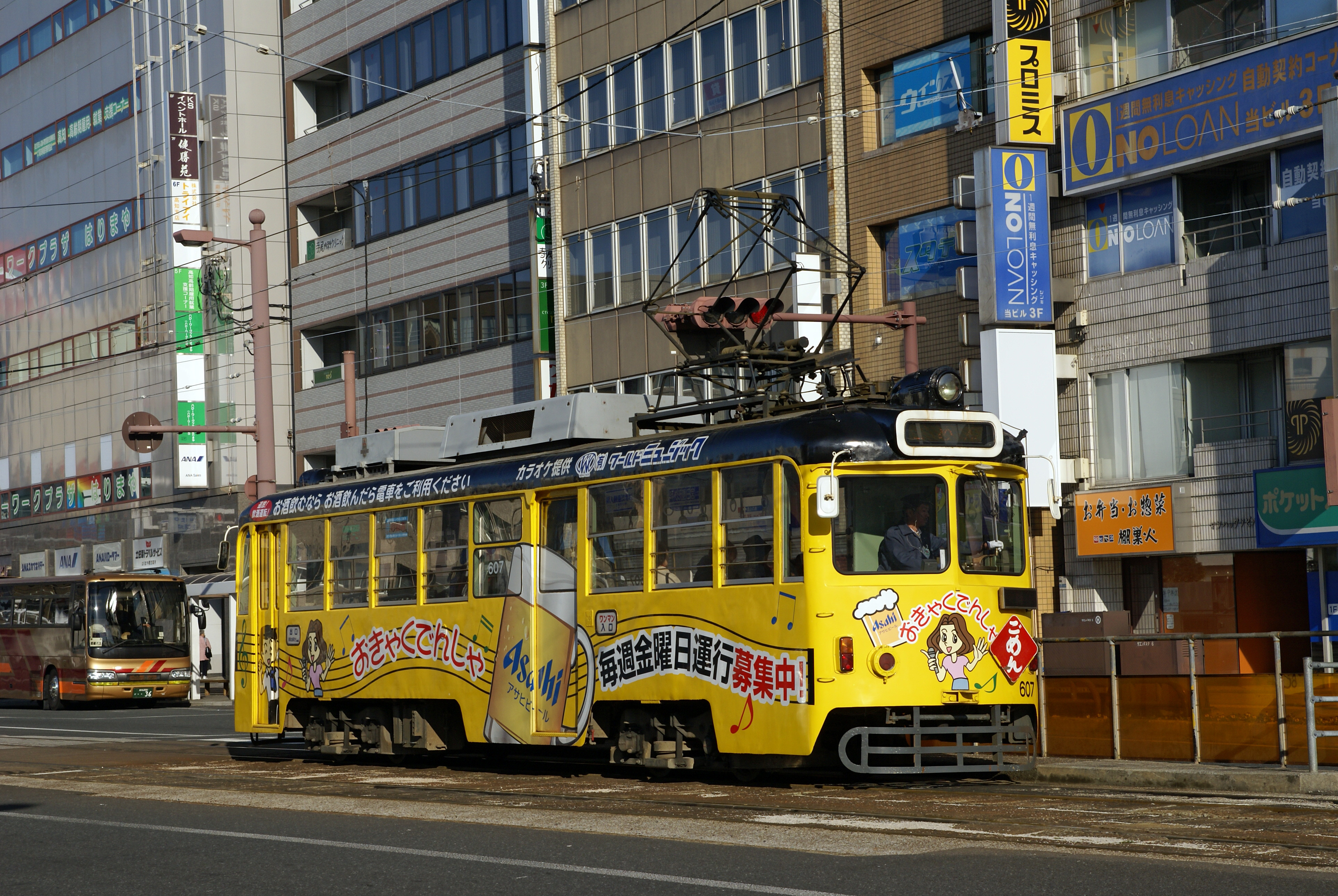 Dentetsu-Tāminarubiru-mae Station in Kōchi, Kōchi Prefecture, Japan